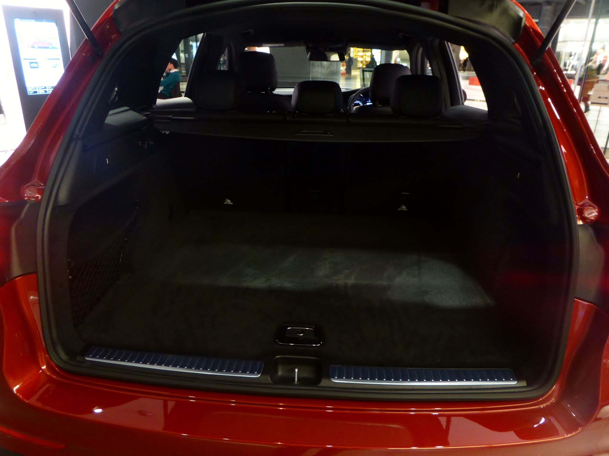 X253型メルセデス・ベンツ・GLC250 4MATICスポーツのトランクルームを撮影。